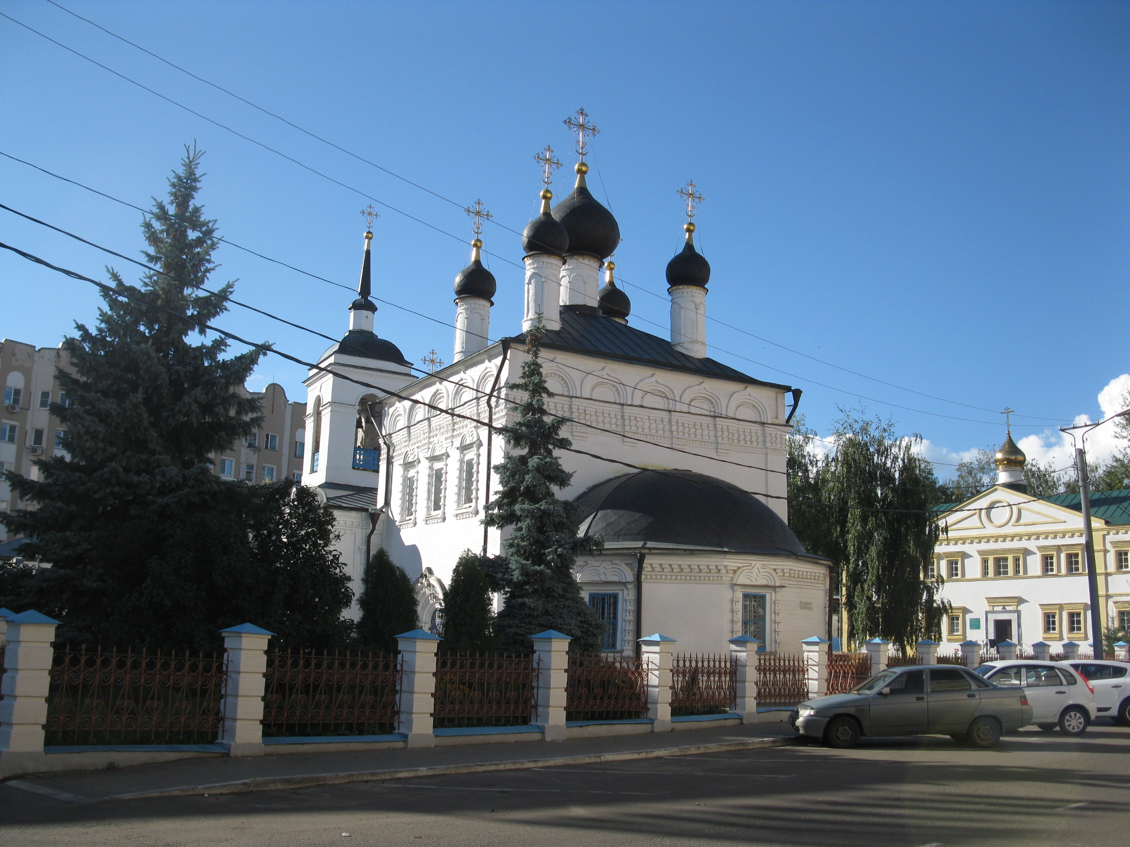 Церковь Иоанна Богослова: Демократическая ул., 28, Саранск, Мордовия